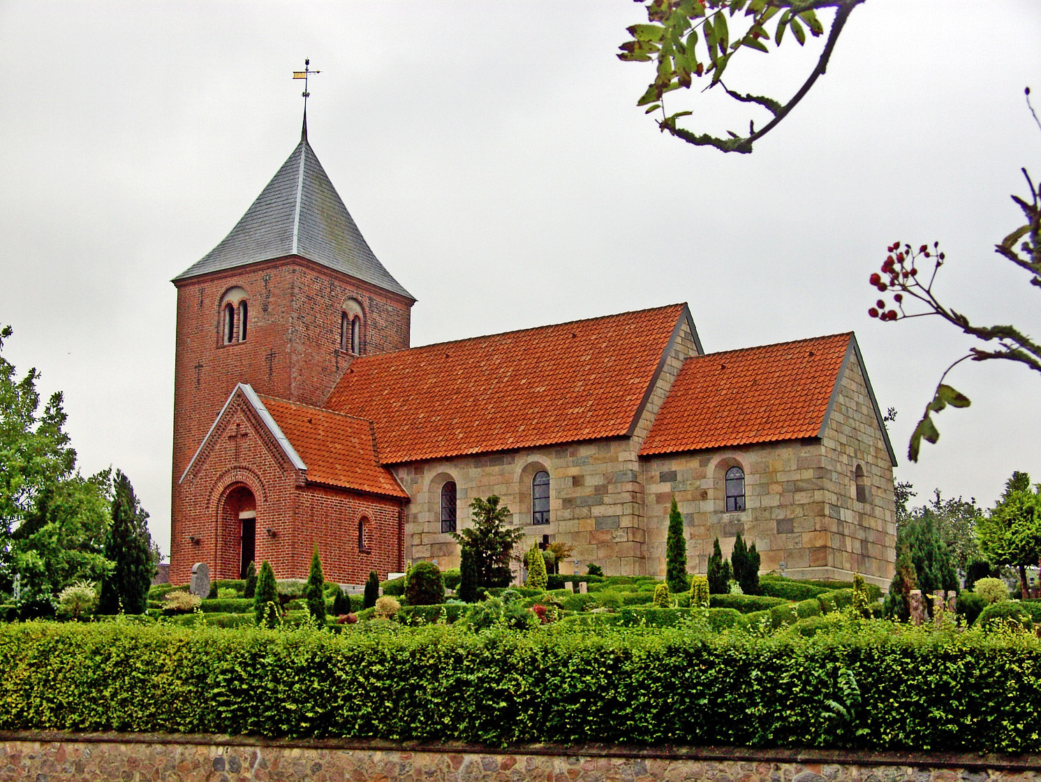 fra sydøst